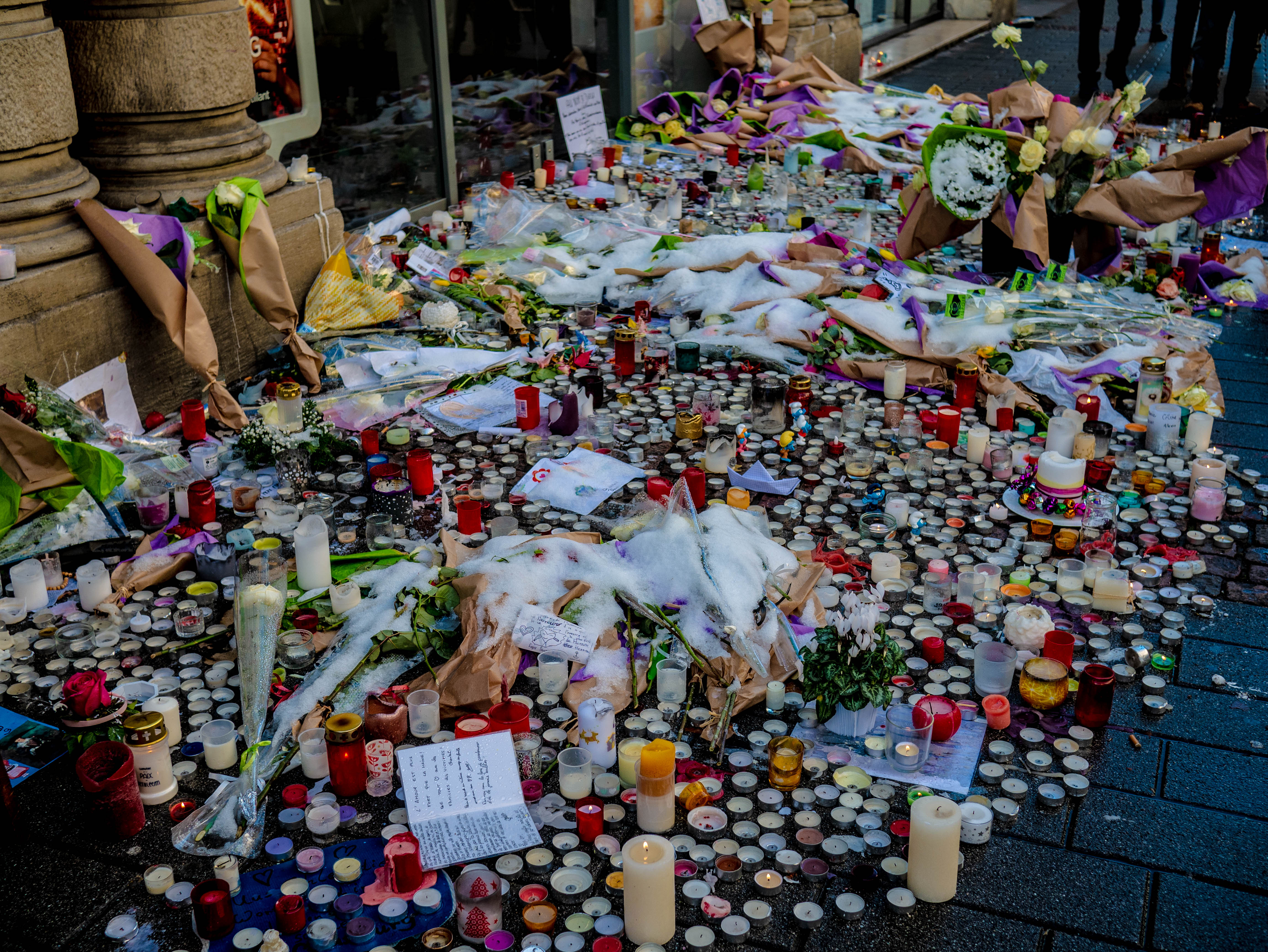 Strasbourg, décembre 2018